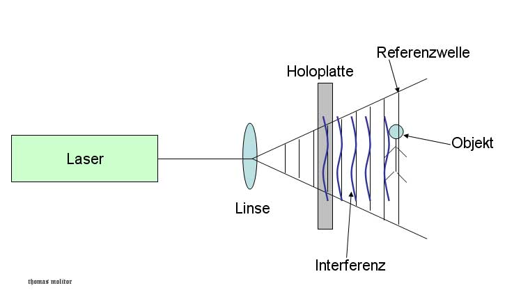 Denisyuk Holographie